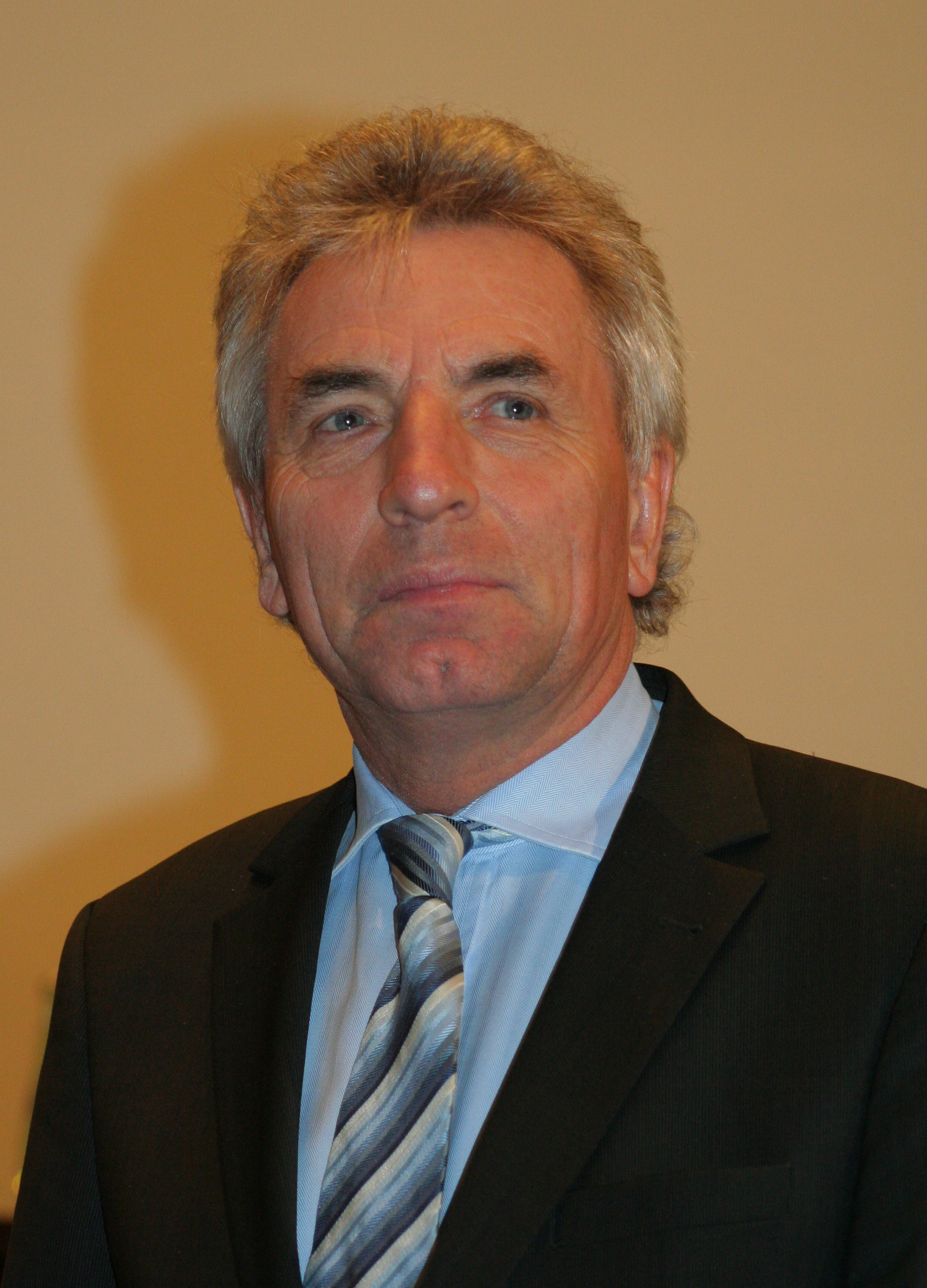 Kölner Oberbürgermeister Jürgen Roters bei einer öffentlichen Diskussion zur städtischen Kulturpolitik im Kölner Rathaus. Januar 2010.